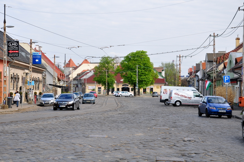 Bécsi út, Budapest District III